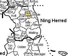 Kort der viser Holme Sogn, Ning Herred, Århus Amt, Denmark.